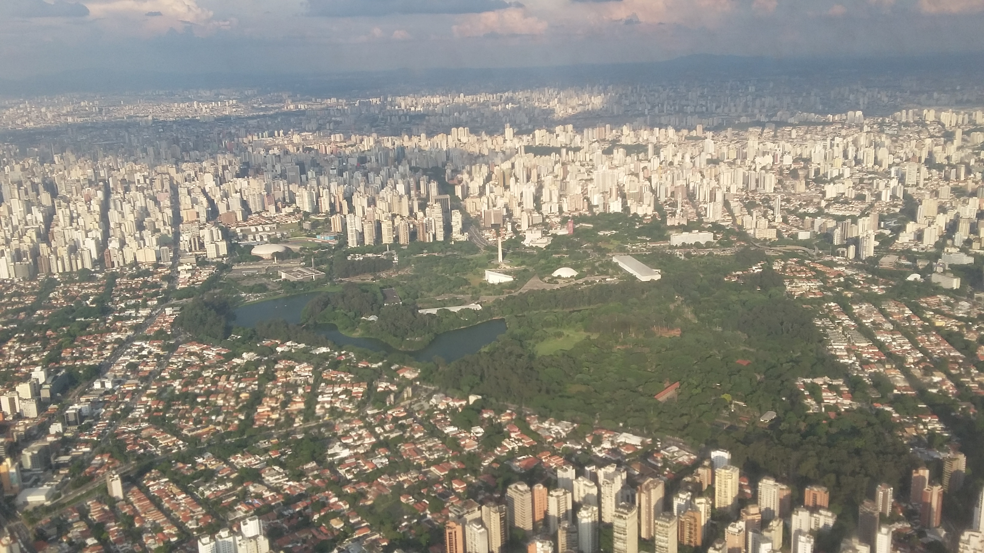 Parque Ibirapuera (vista de um voo São Paulo - Brasília)